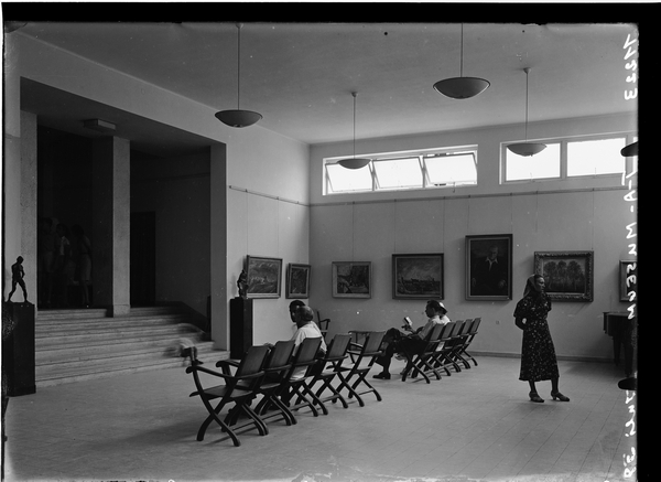 מוזיאון תל אביב, מראה כללי של אולם התצוגה בקומה הראשונה